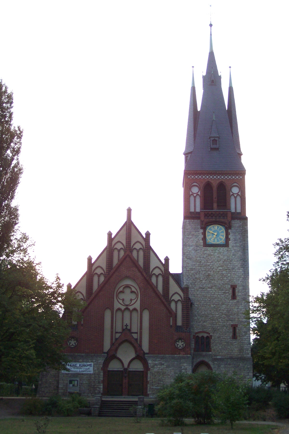 Erkner, Genezareth-Kirche, Portal und Turm (2008-09-22)